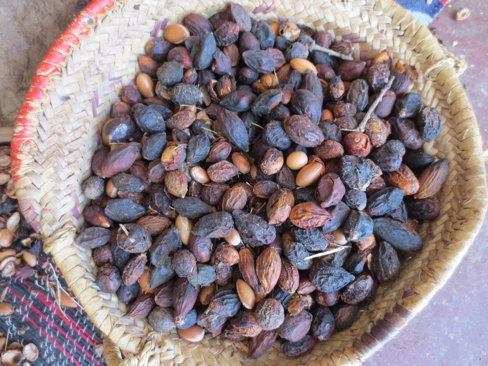 Graine d'argan, entre Marrakech et l'Atlas au Maroc